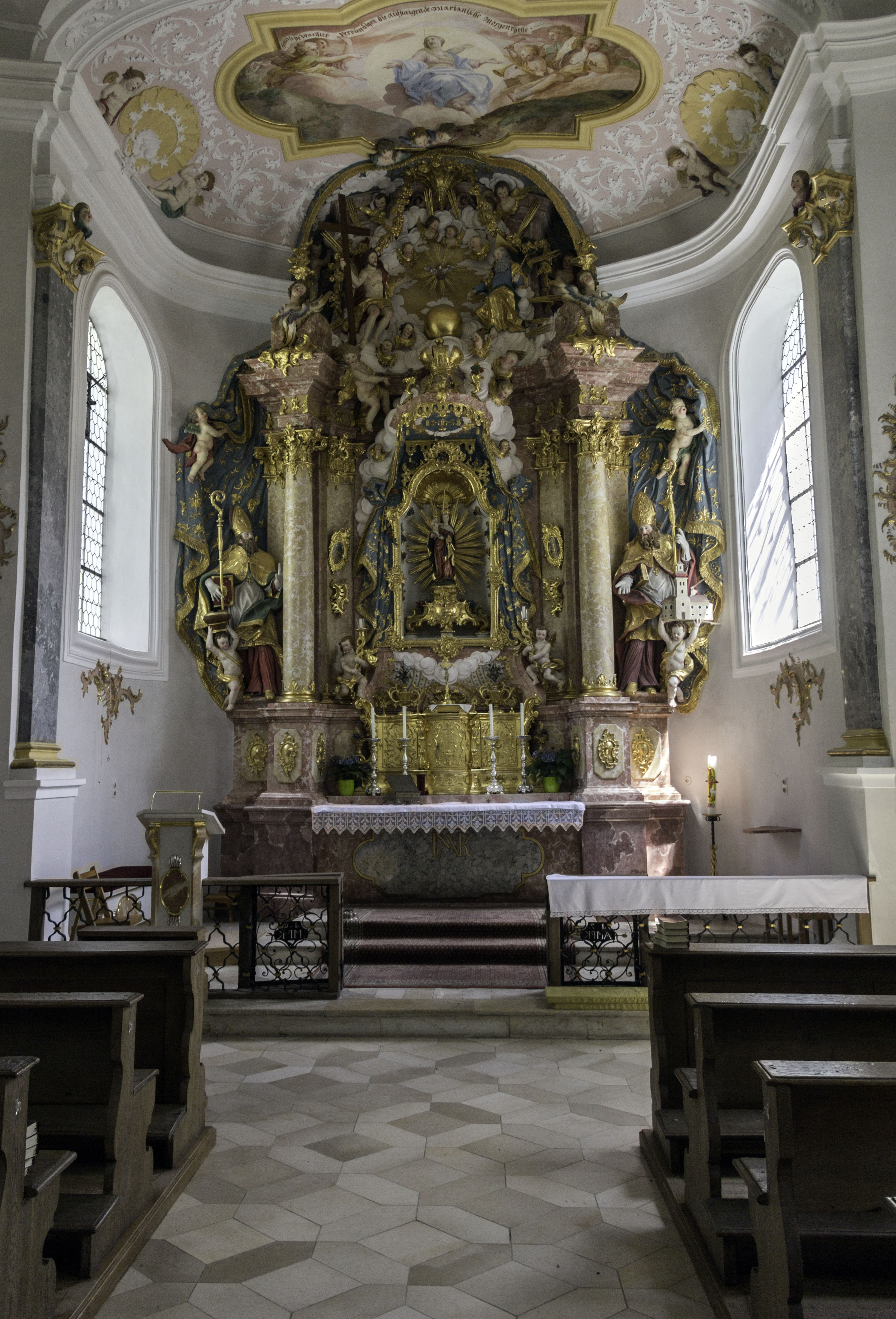 Frauenbergkapelle, Altar